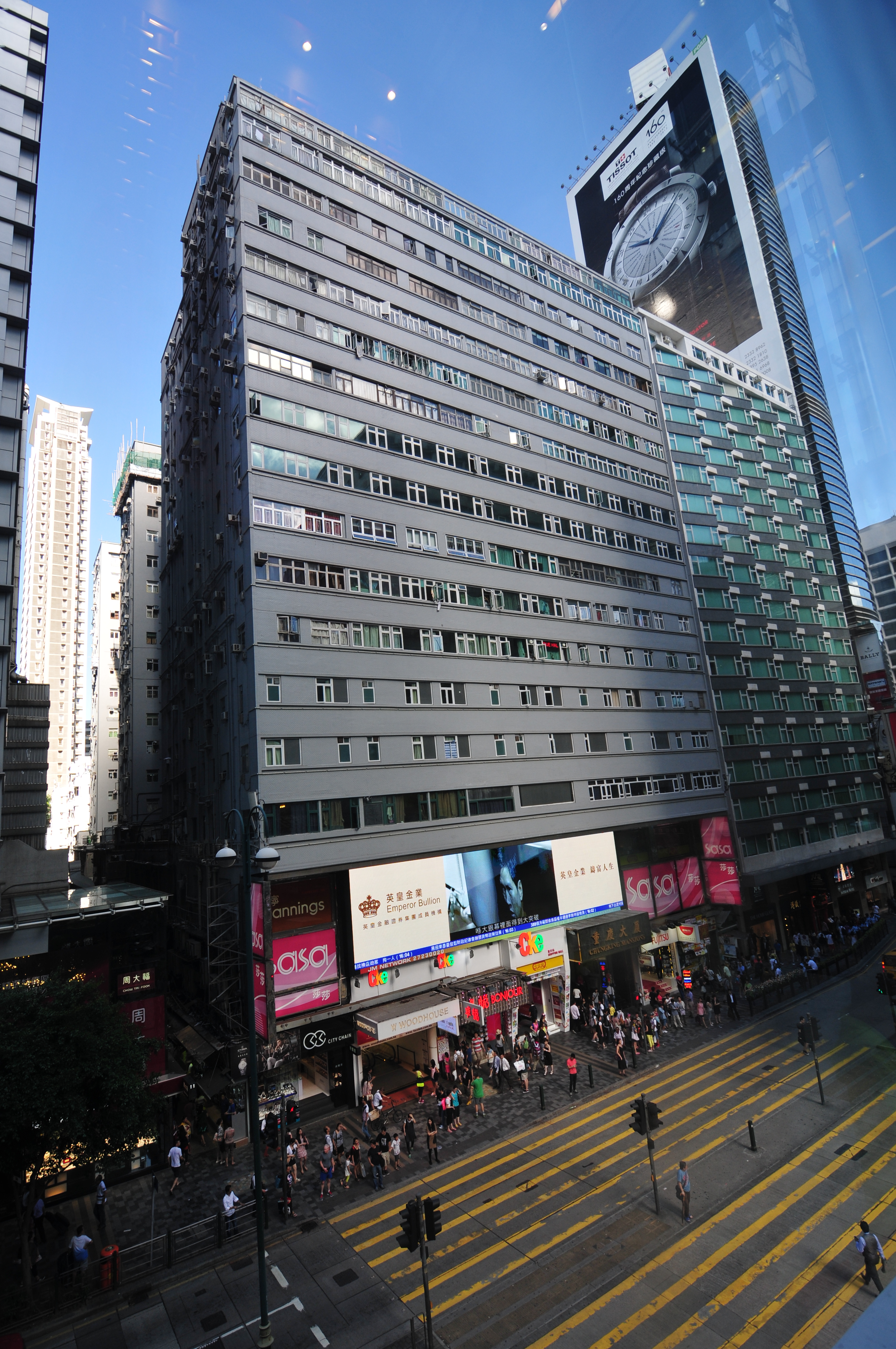 Wikimania 2013 Hongkong